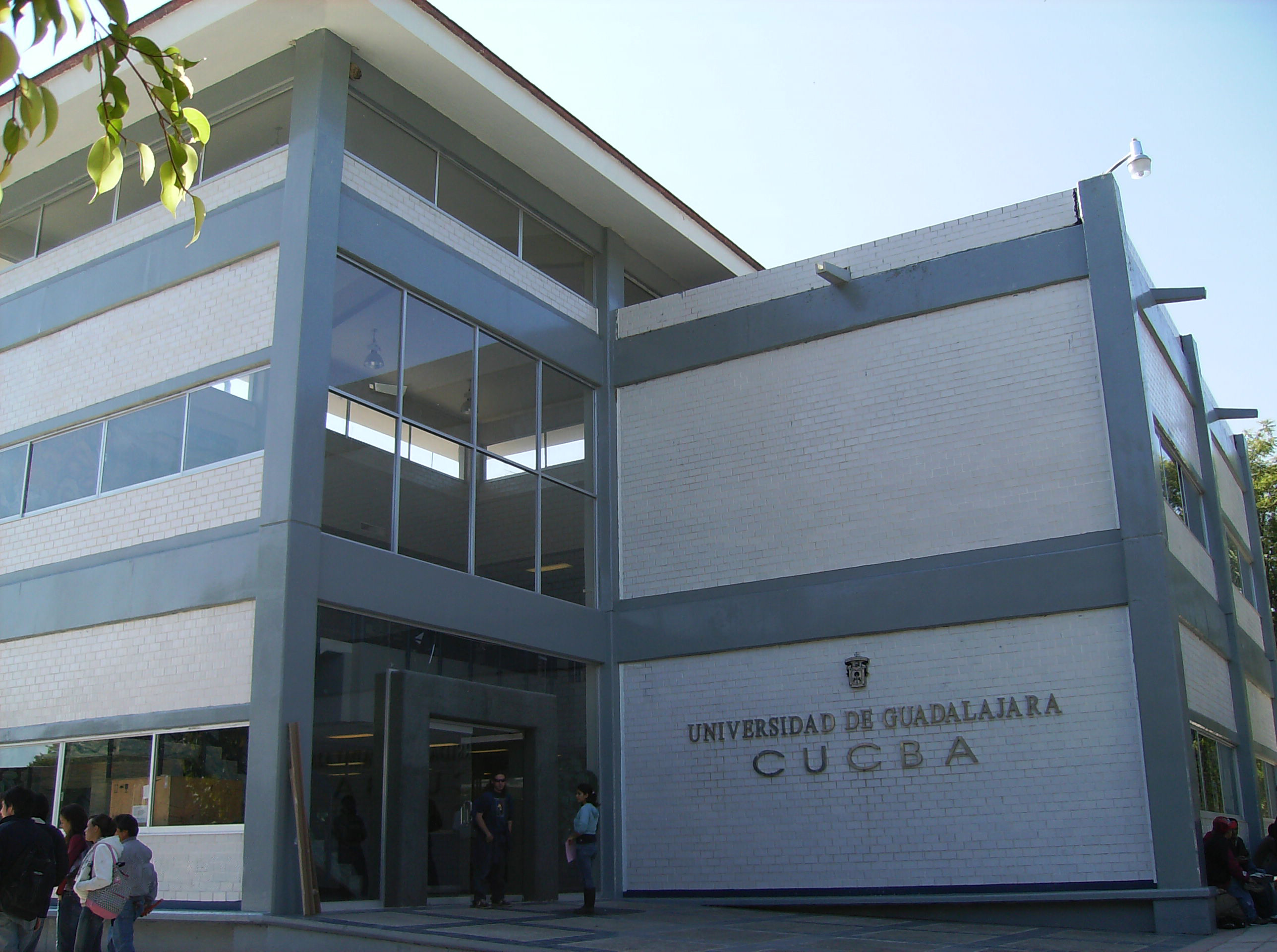 El Centro Universitario de Ciencias Biológicas y Agropecuarias, CUCBA, es uno de los seis centros temáticos de la Universidad de Guadalajara, destinado a estudios de educación superior como son técnico superior universitario, licenciatura y posgrado. Se ubica en las afueras de la Zona Metropolitana de Guadalajara, a 15km por la carretera a Nogales, en Las Agujas, Zapopan.